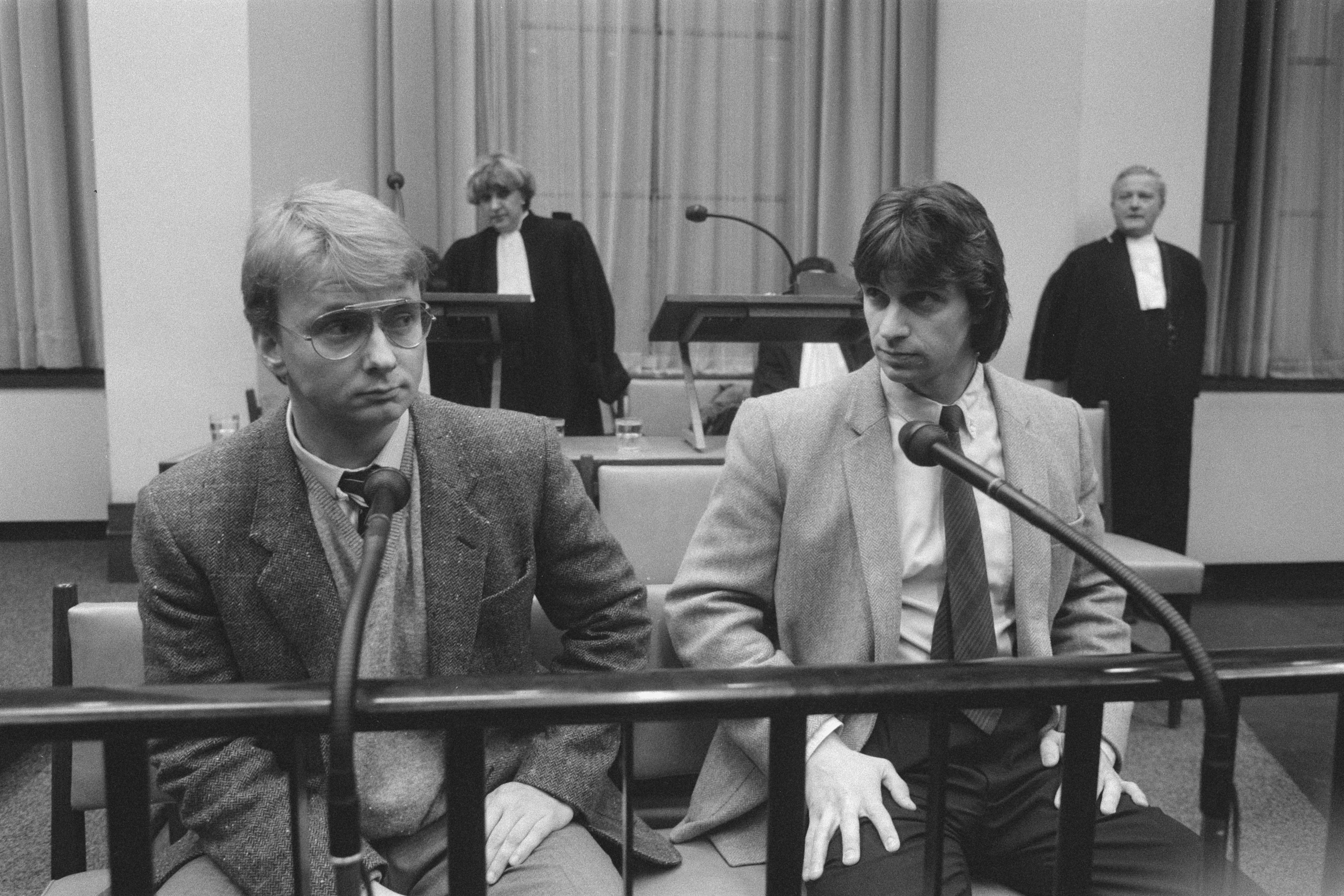 Proces tegen Heinekenontvoerders Cor van Hout en Willem Holleeder (rechts) in het Paleis van Jusitie in Amsterdam.